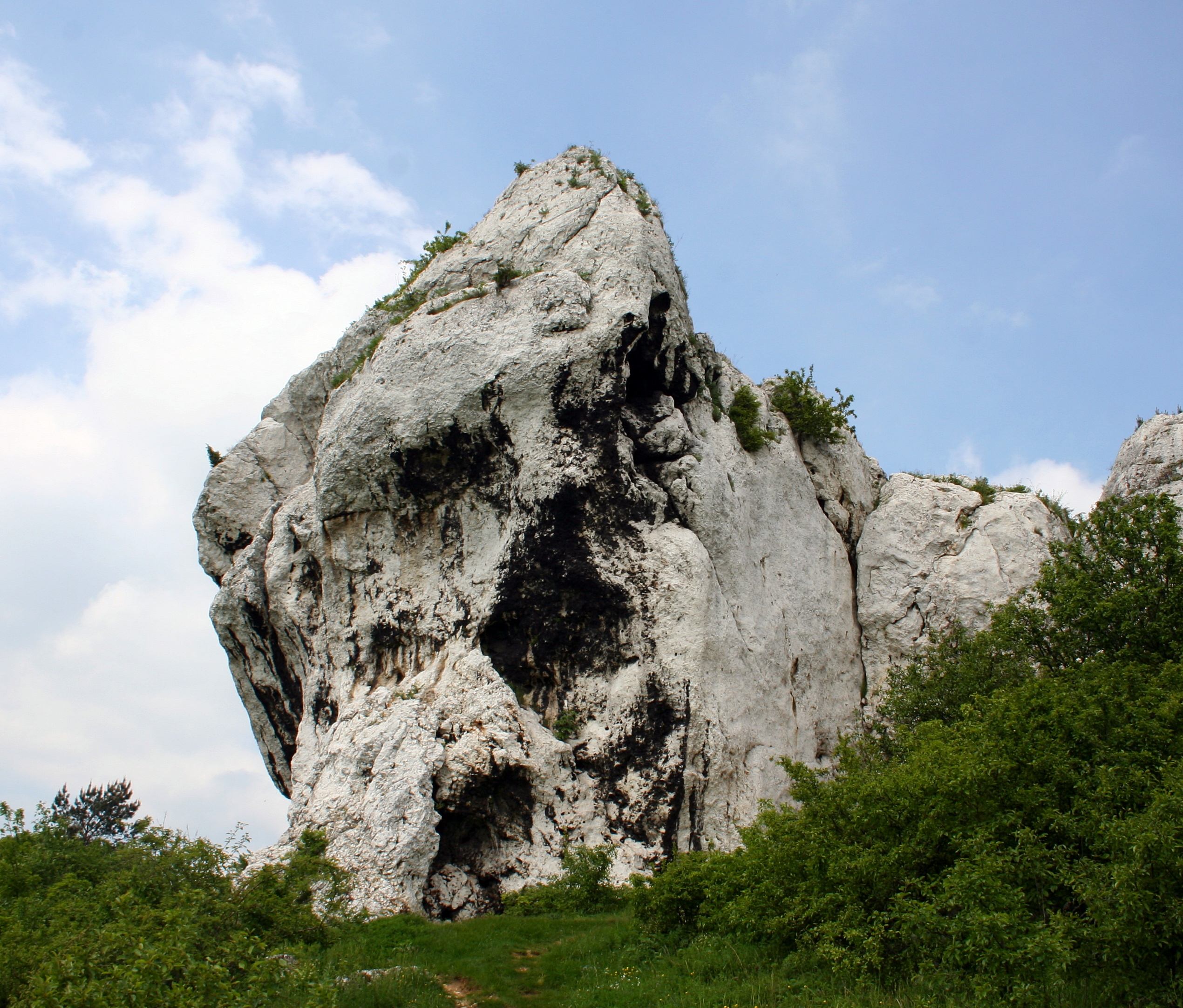 Skały Rzędkowickie. Studnisko.